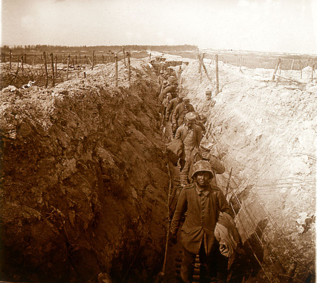 Duitse gevangenen op de flanken van de Cornillet.